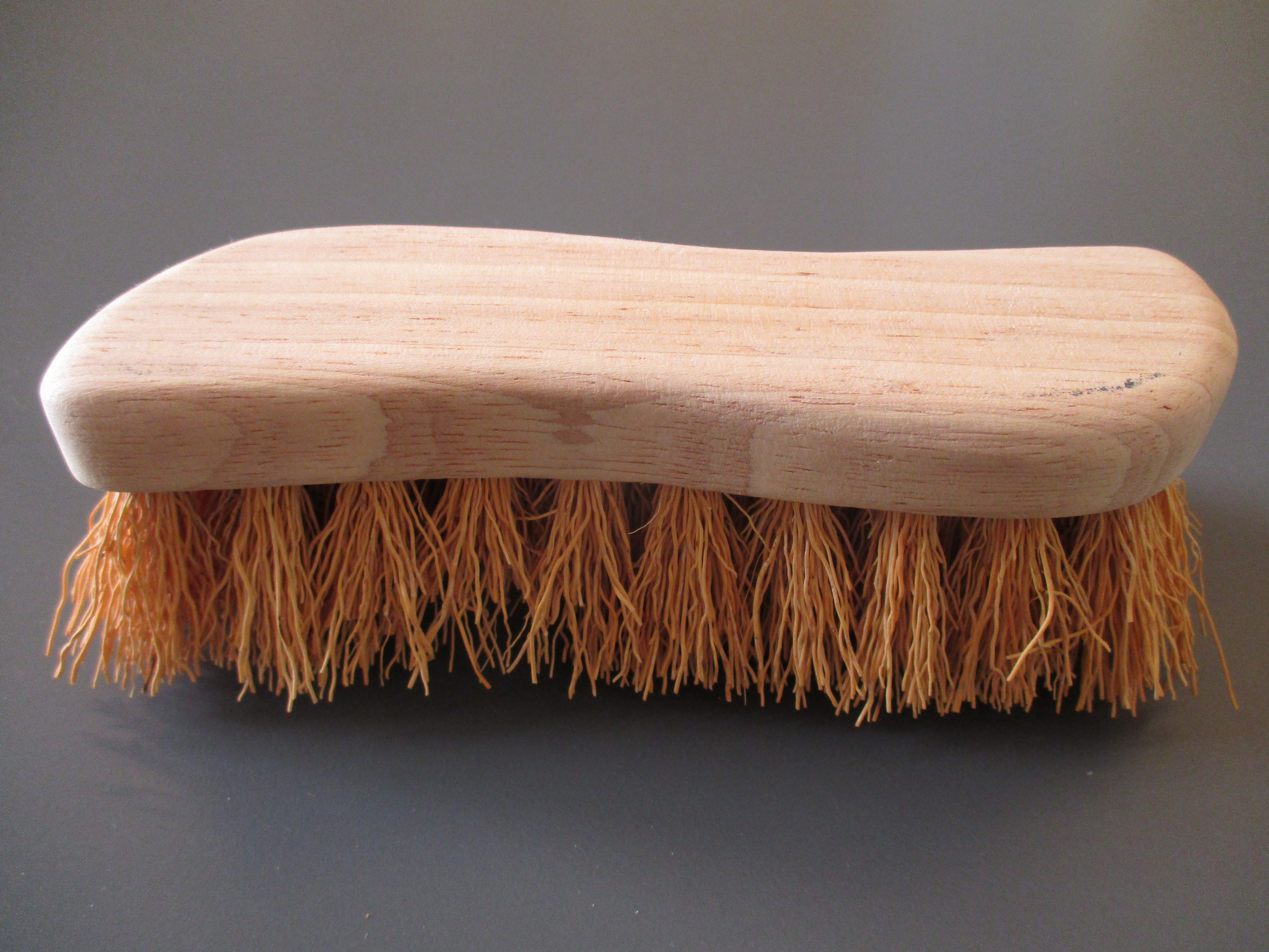 Brosse de ménage à monture en hêtre et fibres de chiendent